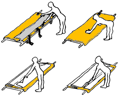 Préparation du matelas immobilisateur à dépression : rangement des sangles, répartition des billes et mise en place du drap. Auteur : Christophe Dang Ngoc Chan (Cdang), dessin original numérisé.